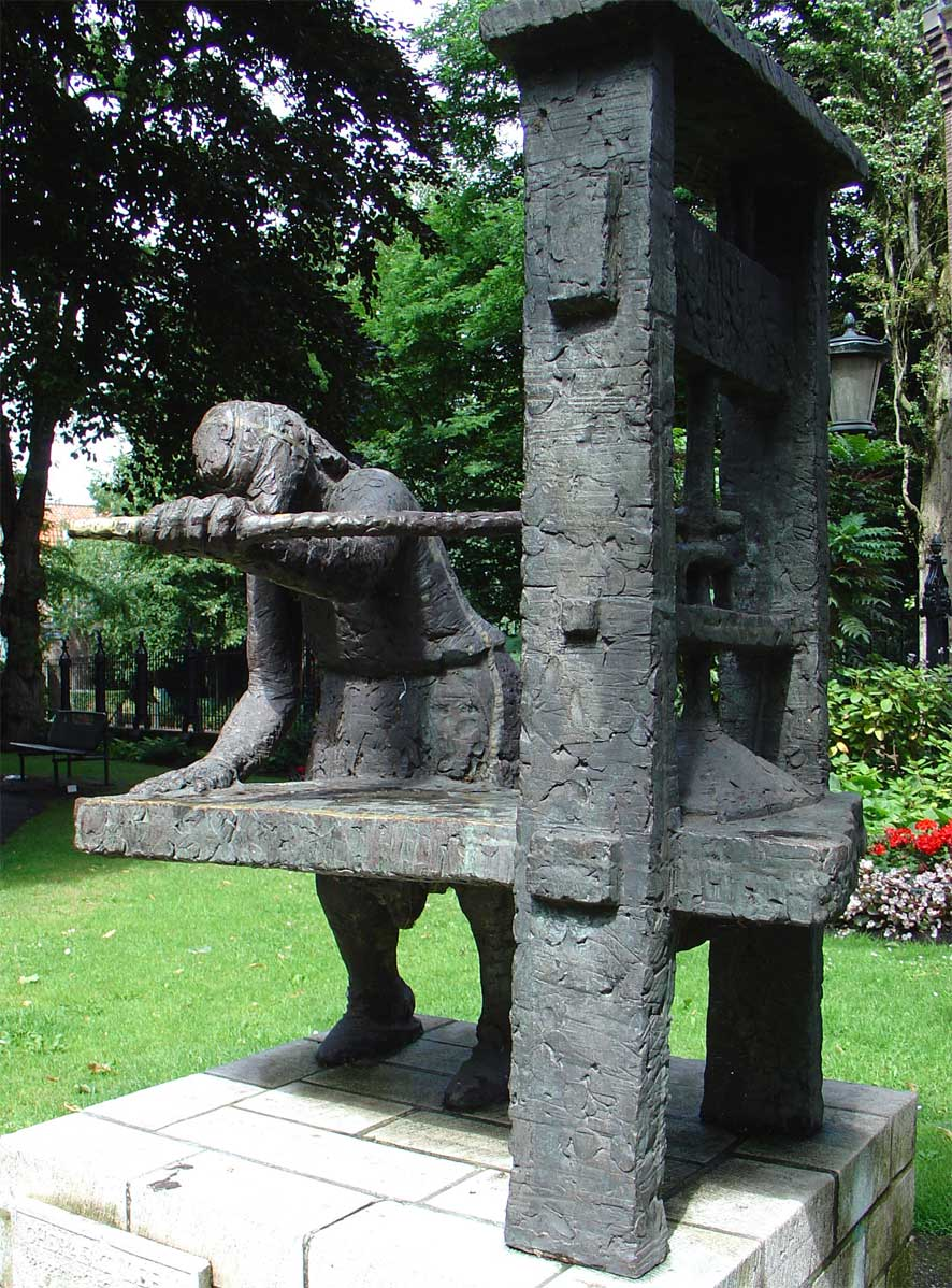 Standbeeld van Gheraert Leeu (brons, 1976) boekdrukker te Gouda - in de Willem Vroesentuin te Gouda, gemaakt door Roel Bendijk (1937)